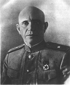 Фотография Героя Советского Союза Гуртьев, Леонтий Николаевич, погибшего в 1943 году